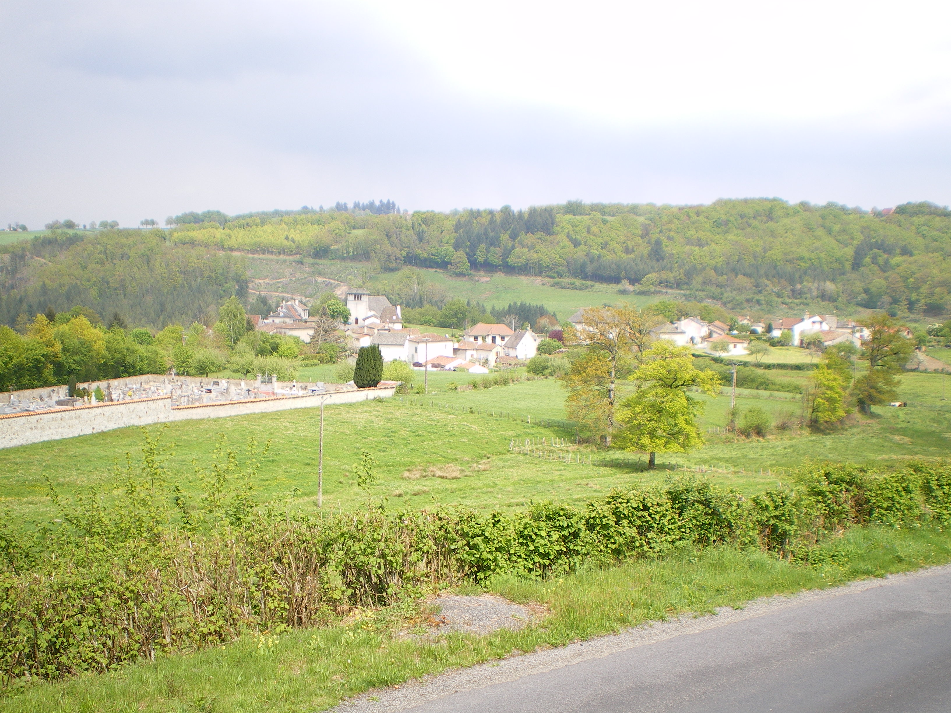 Pers, Cantal, France